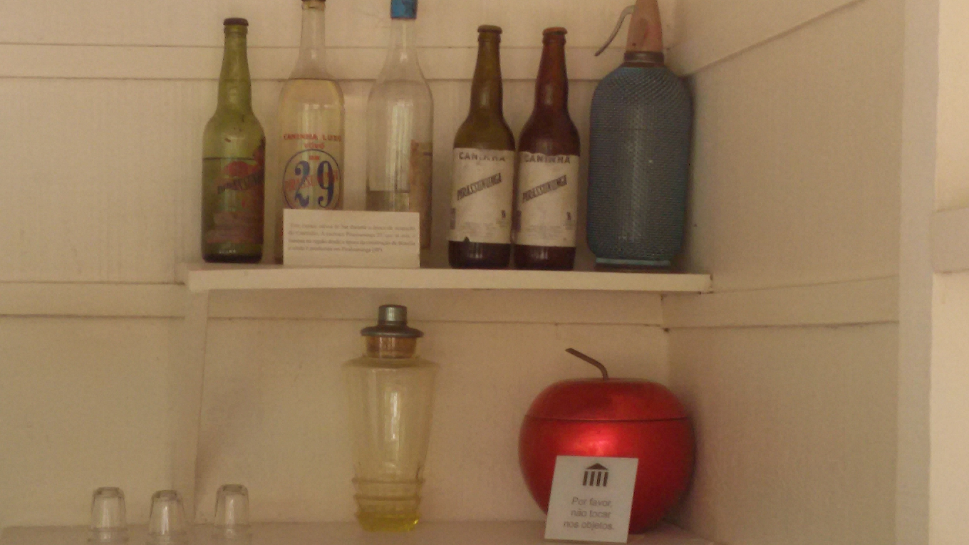 hay algunas bebidas del Presidente Jk aun.